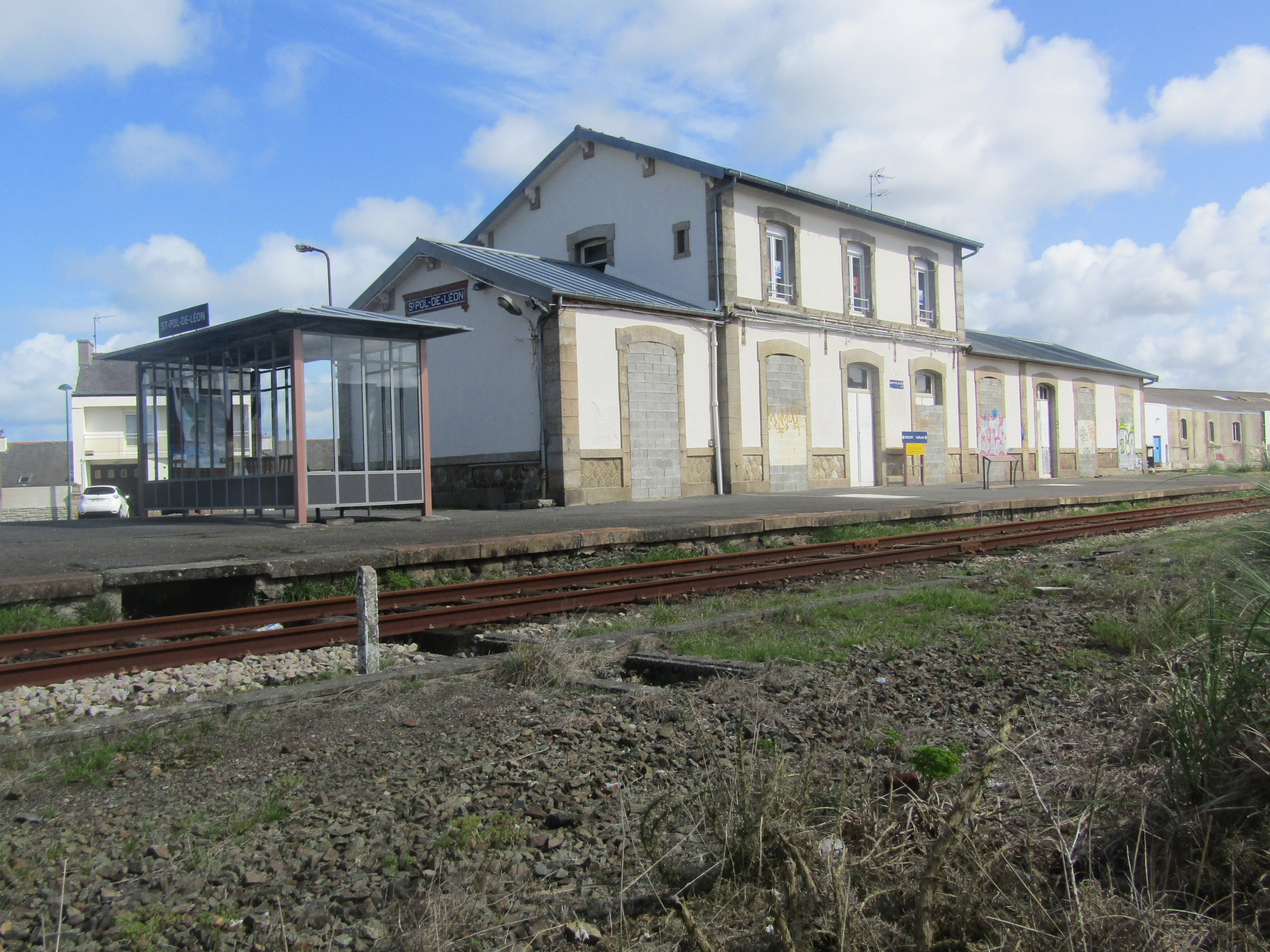 L'ensemble du batiment voyageurs en 2017